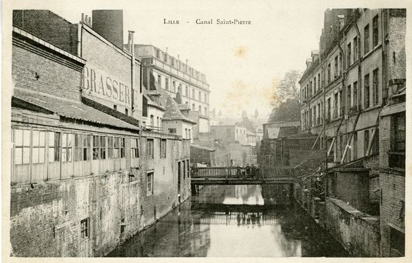 Lille : Canal Saint Pierre ou canal du Pont de Weppes. Photo prise à l'angle de l'actuelle rue de Weppe et de la rue du Cirque. Le canal longeait en aval l'actuelle façade Nord de la cathédrale Notre Dame de la Treille (place Gilleson). À son amont, le canal de Weppes menait à la moyenne Deûle (Canal de la Moyenne-Deûle actuel) par le biais du "Quai du Wault". Voir les sites web : & Dimensions de la photo: 9 x 14 cm. les métadonnées en bas de cette page fournissent des informations supplémentaires sur ce cliché.